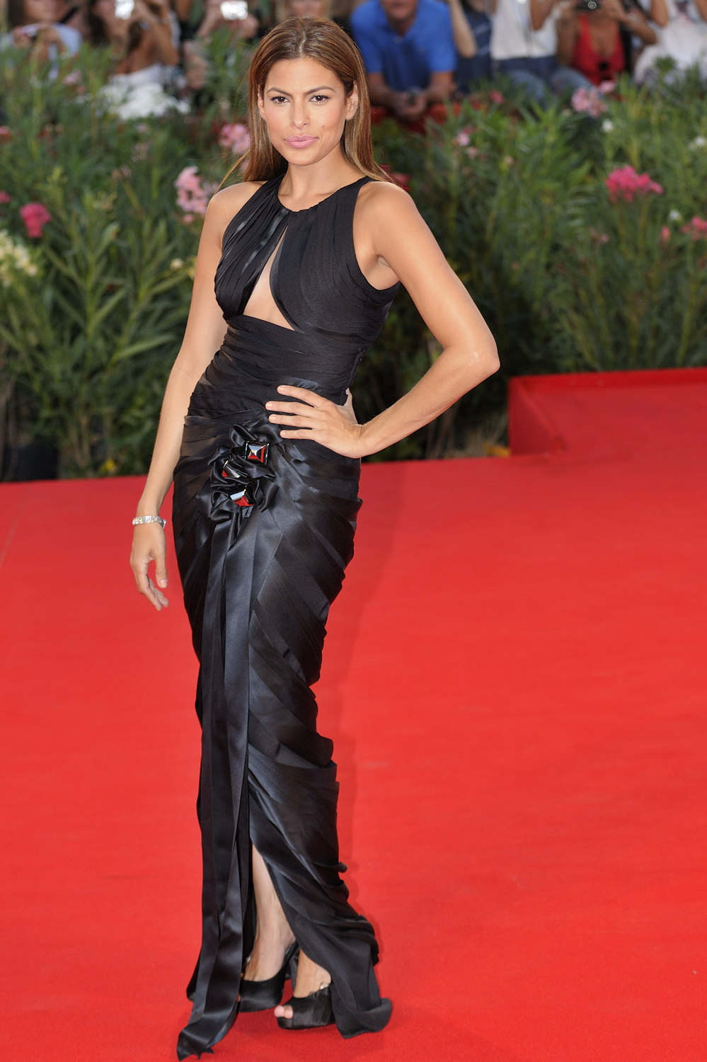 66ème Festival du Cinéma de Venise (Mostra), 3ème jour (04/09/2009) Tapis Rouge avec Nicolas Cage, Eva Mendes et le réalisateur Werner Herzog pour le film : Bad Lieutenant : Port of Call New Orleans